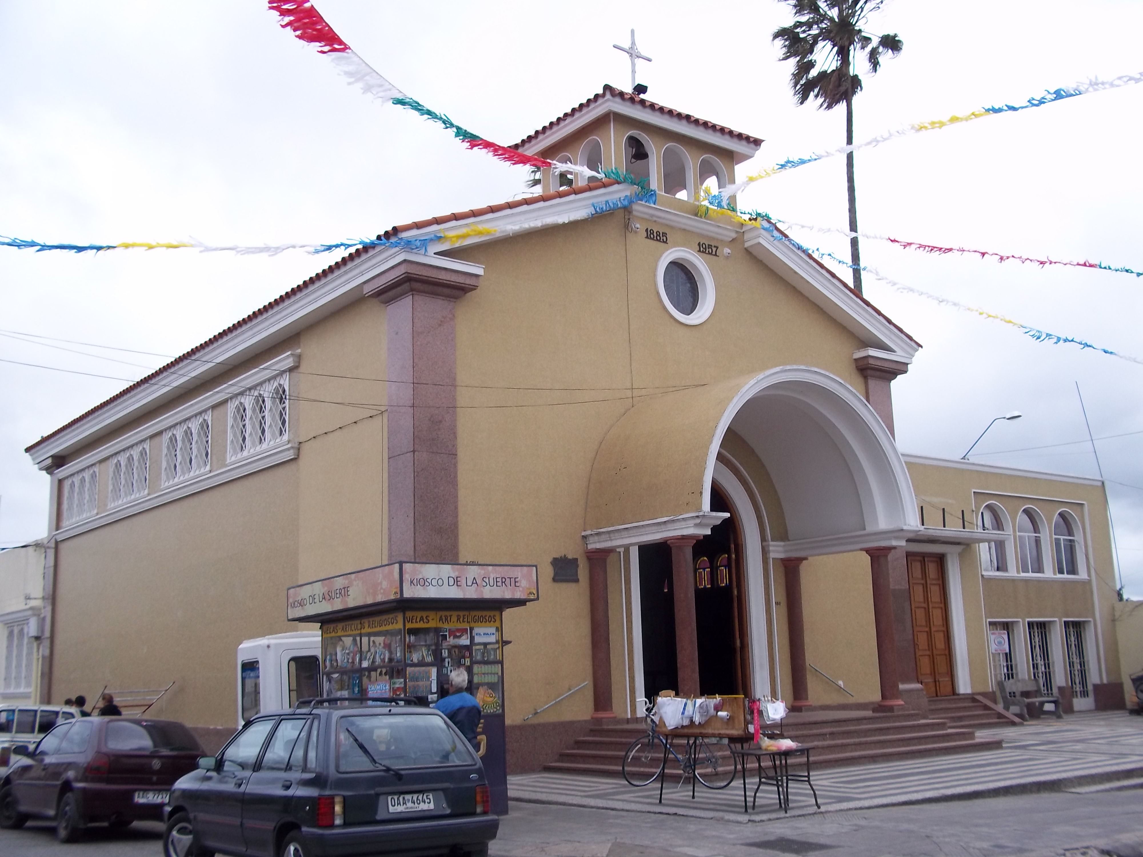 Iglesia donde se encuentra la imagen de San Cono en la ciudad de Florida, del departamento homónimo, en Uruguay.